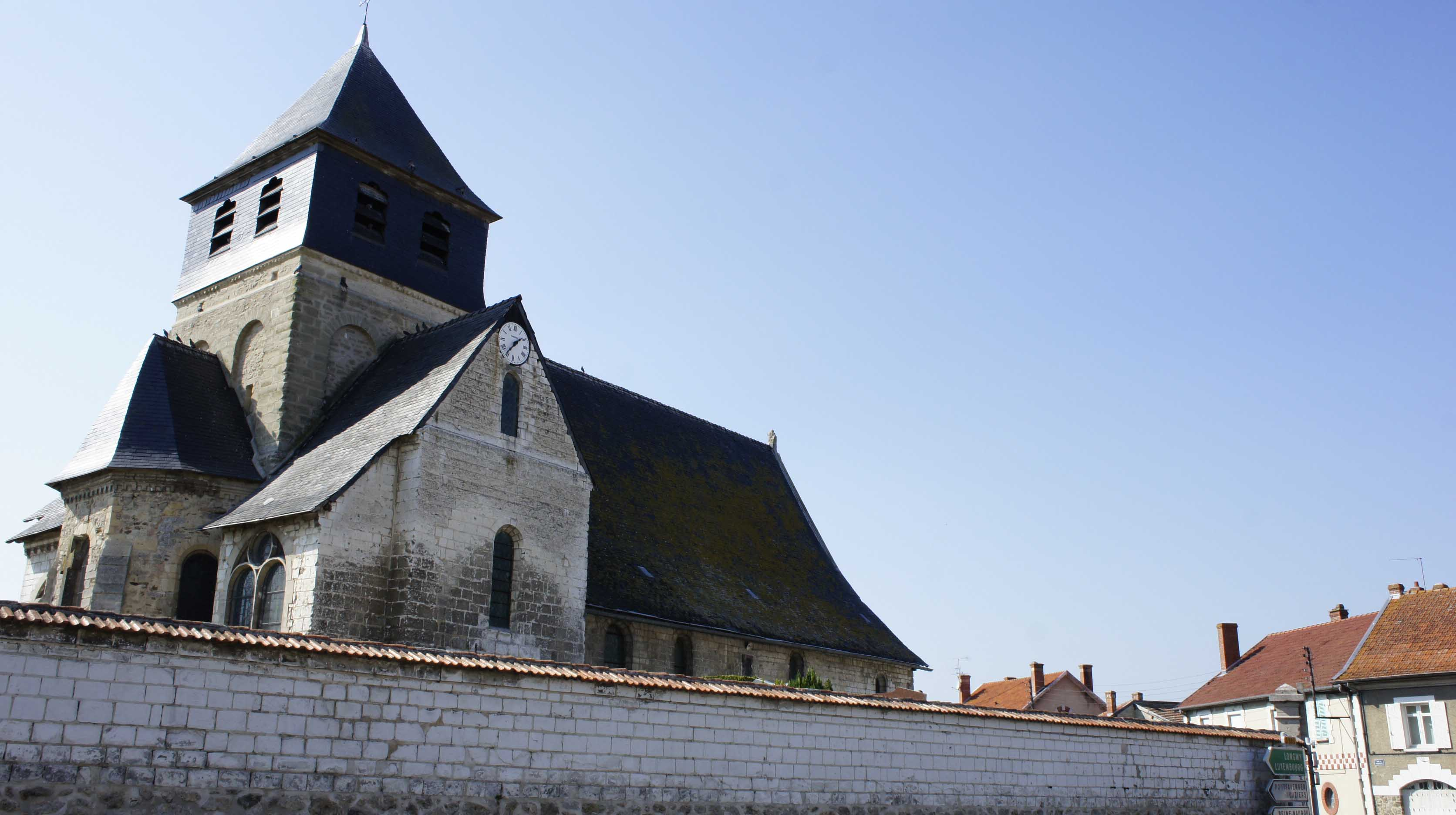 Vue de l'église d'Epoye, monument du XIVe siècle qui est classé monument historique. .